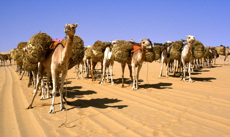 Salzkarawane, Dromedare auf dem Weg von Agadez nach Bilma in Niger